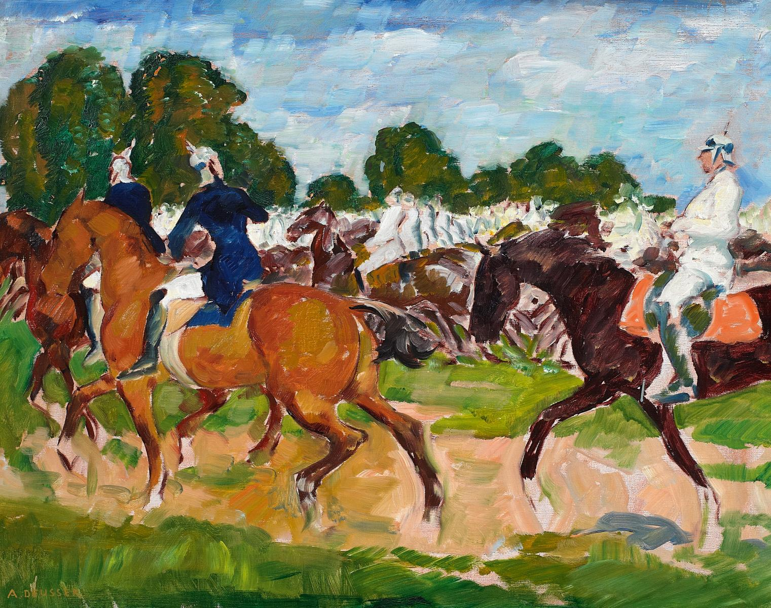 Kürrassiere